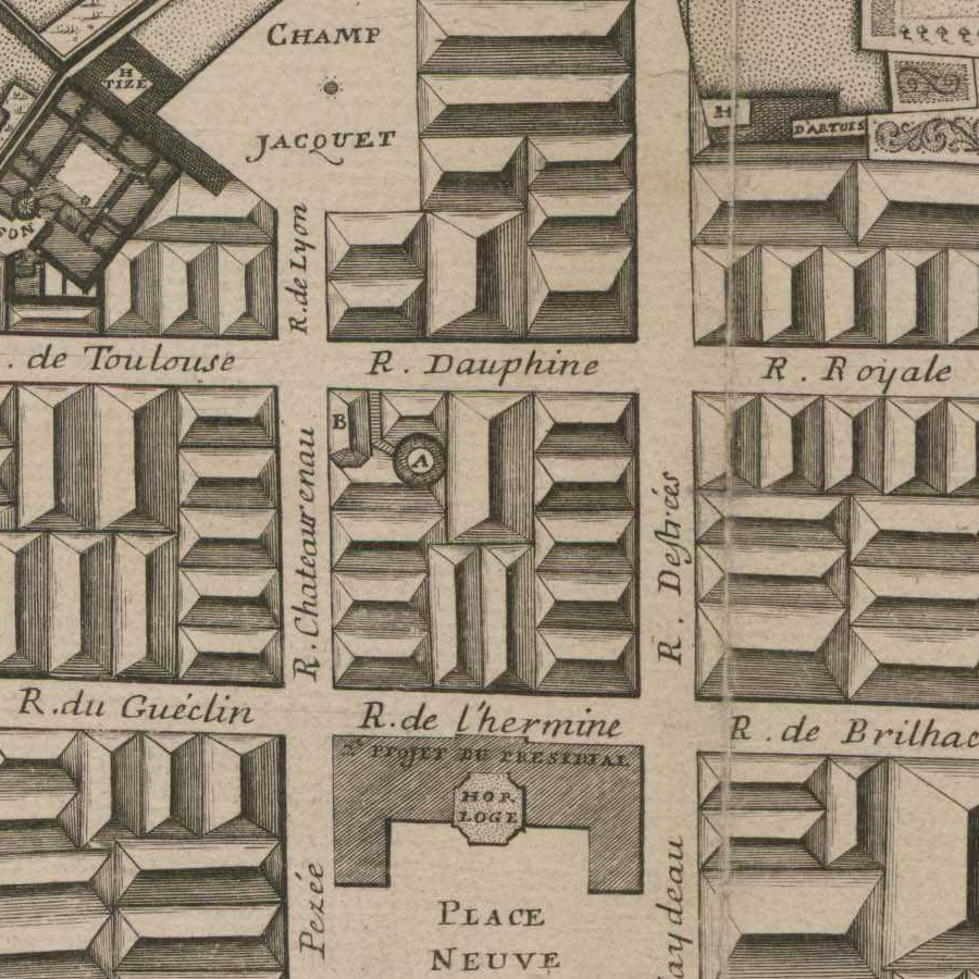 Détail du plan de Rennes (après l'incendie de 1720) gravé en 1726 et montrant l'ancienne et la nouvelle tour de l'horloge de Rennes.